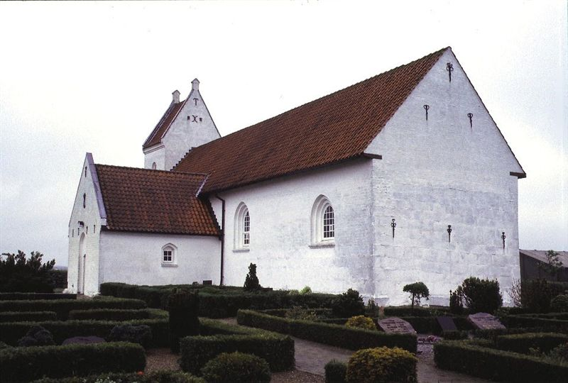 Alstrup Kirke i Danmark. Alstrup kirke